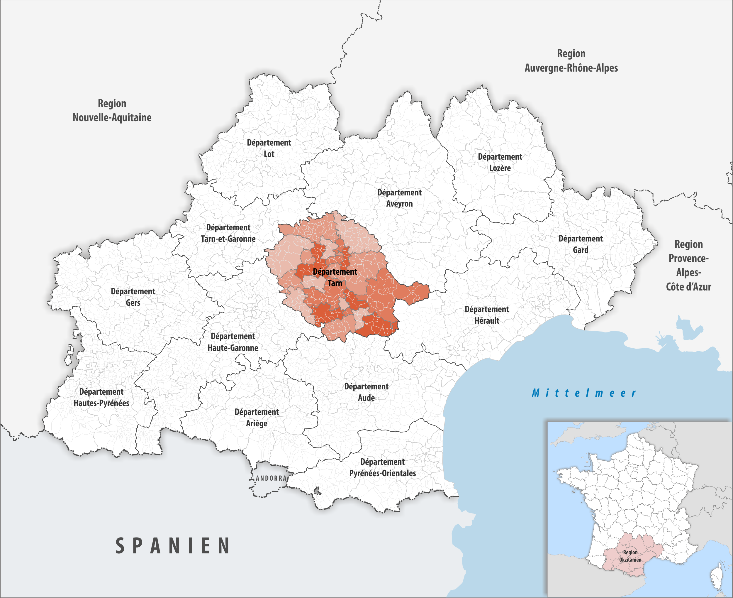 Lage des Departements Tarn